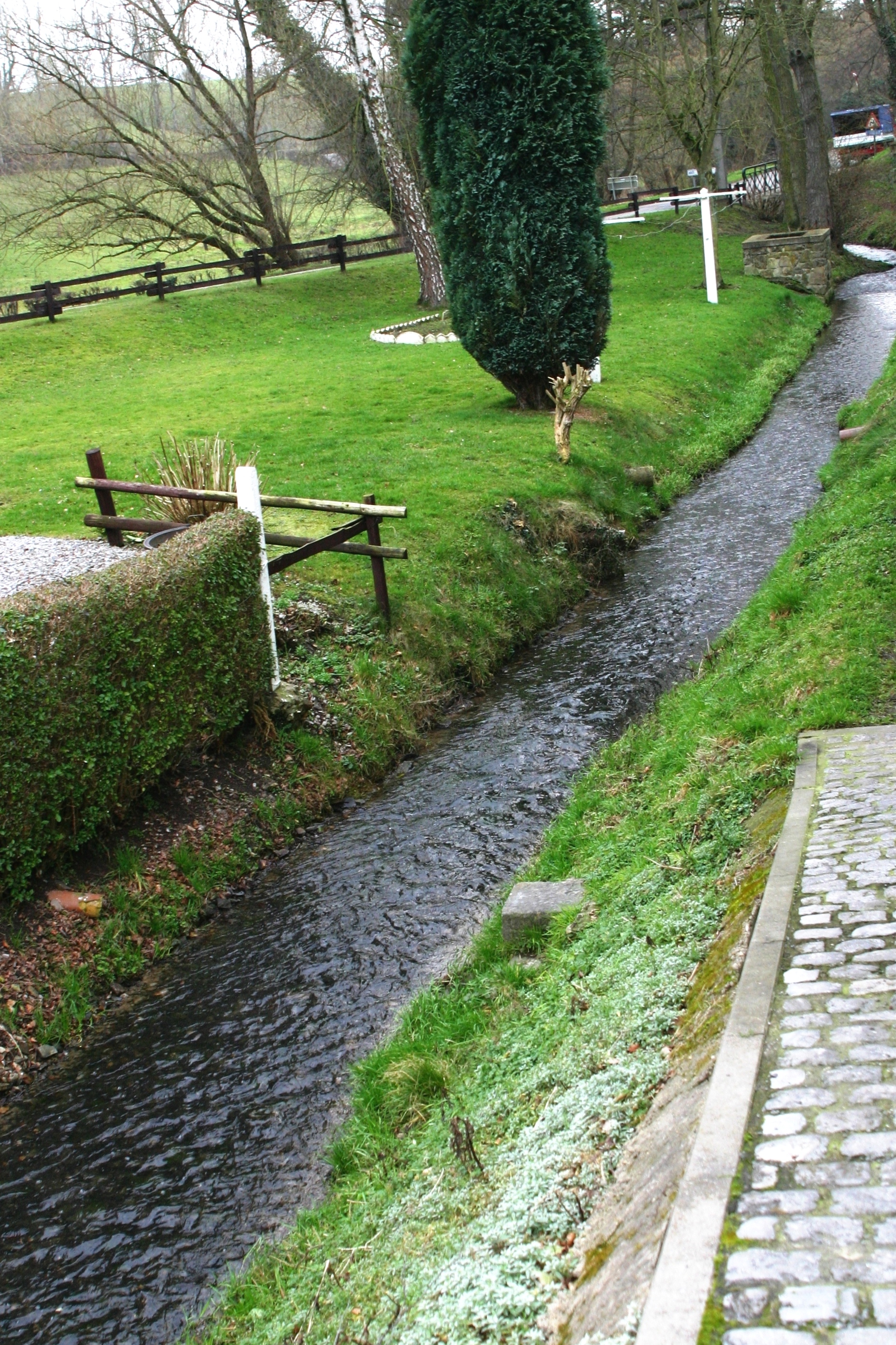 De Bolland an der Sortie vun der Uertschaft Bolland.